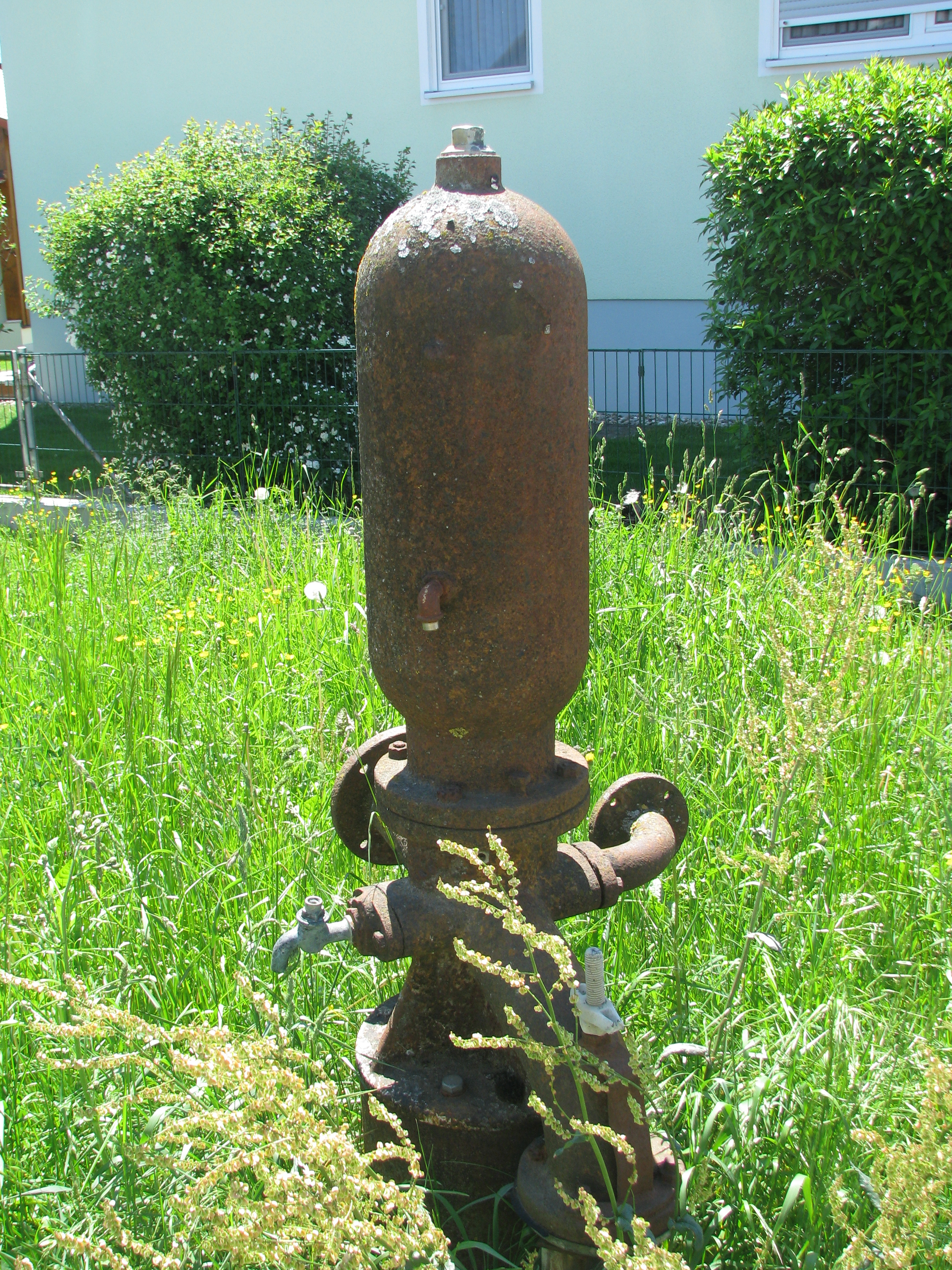 Hilzhofen (Pilsach NM), mechanischer Widder einer ehemaligen Wasserversorgungsanlage des Dorfes